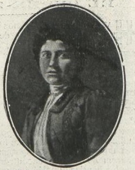 María Echarri.